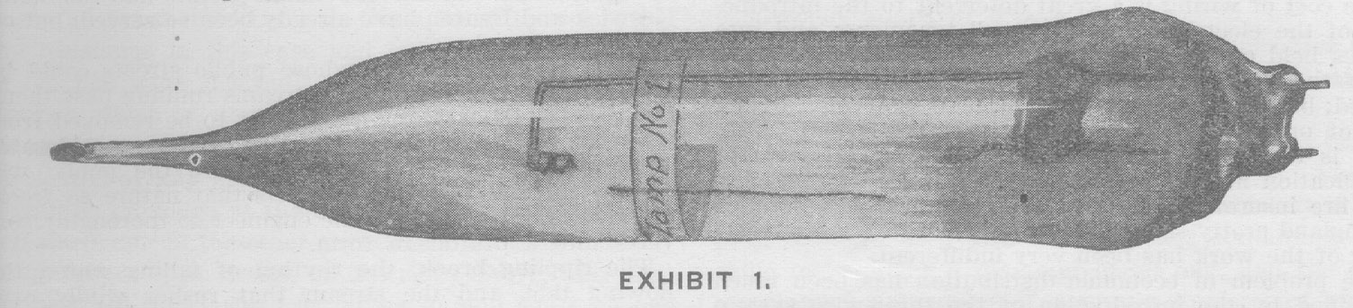 Goebel lamp No 01, litigation 1893 Boston